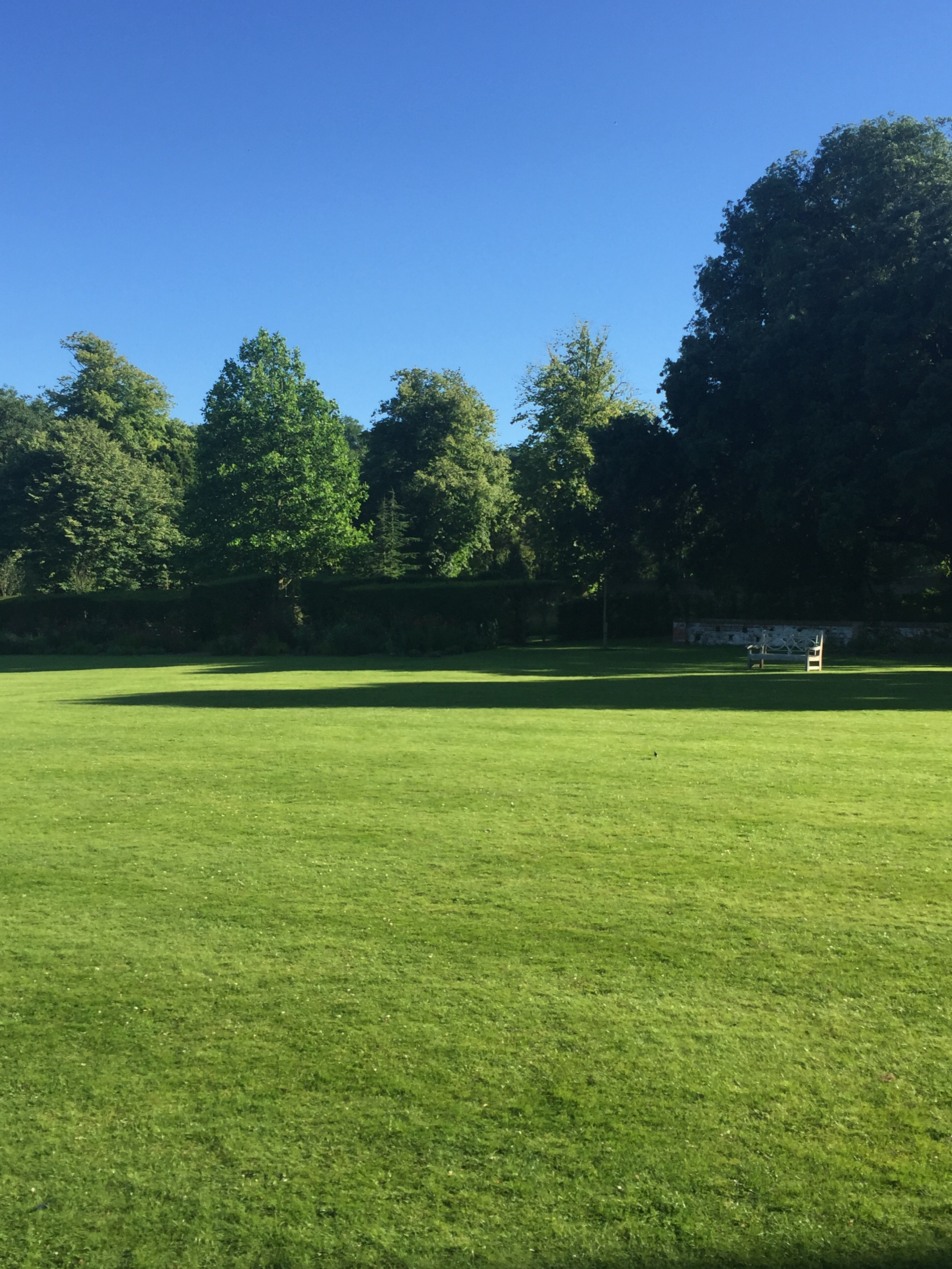 Garden at Glyndebourne